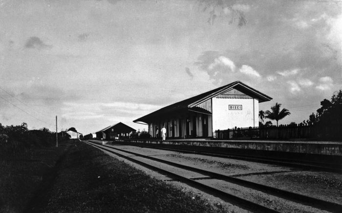 Foto. Het station van Diski aan de Deli-spoorlijn, oostkust Sumatra